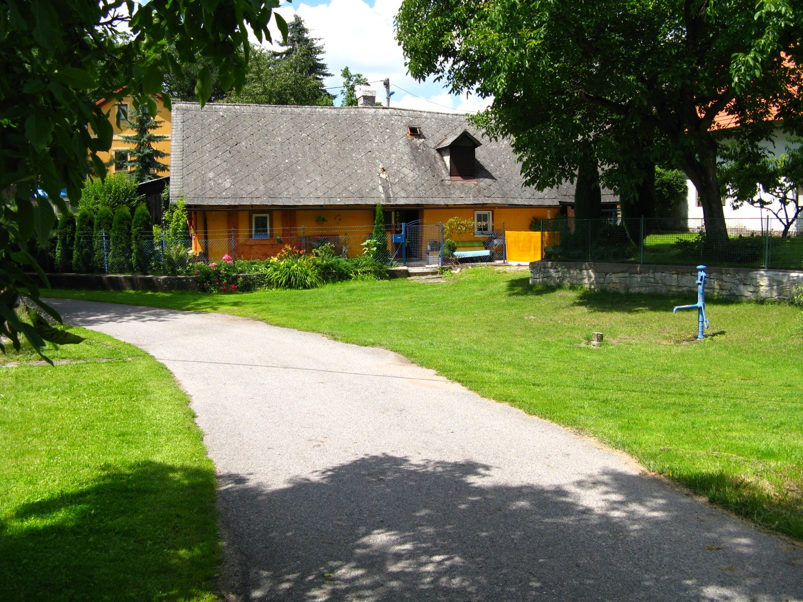 Zájezd - náves